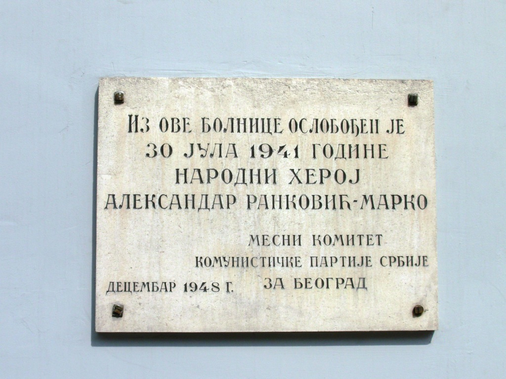 Tabla na „staroj očnoj“ bolnici, ulica Džorža Vašingtona bivša Vidinska, Beograd. Slikao Goldfinger